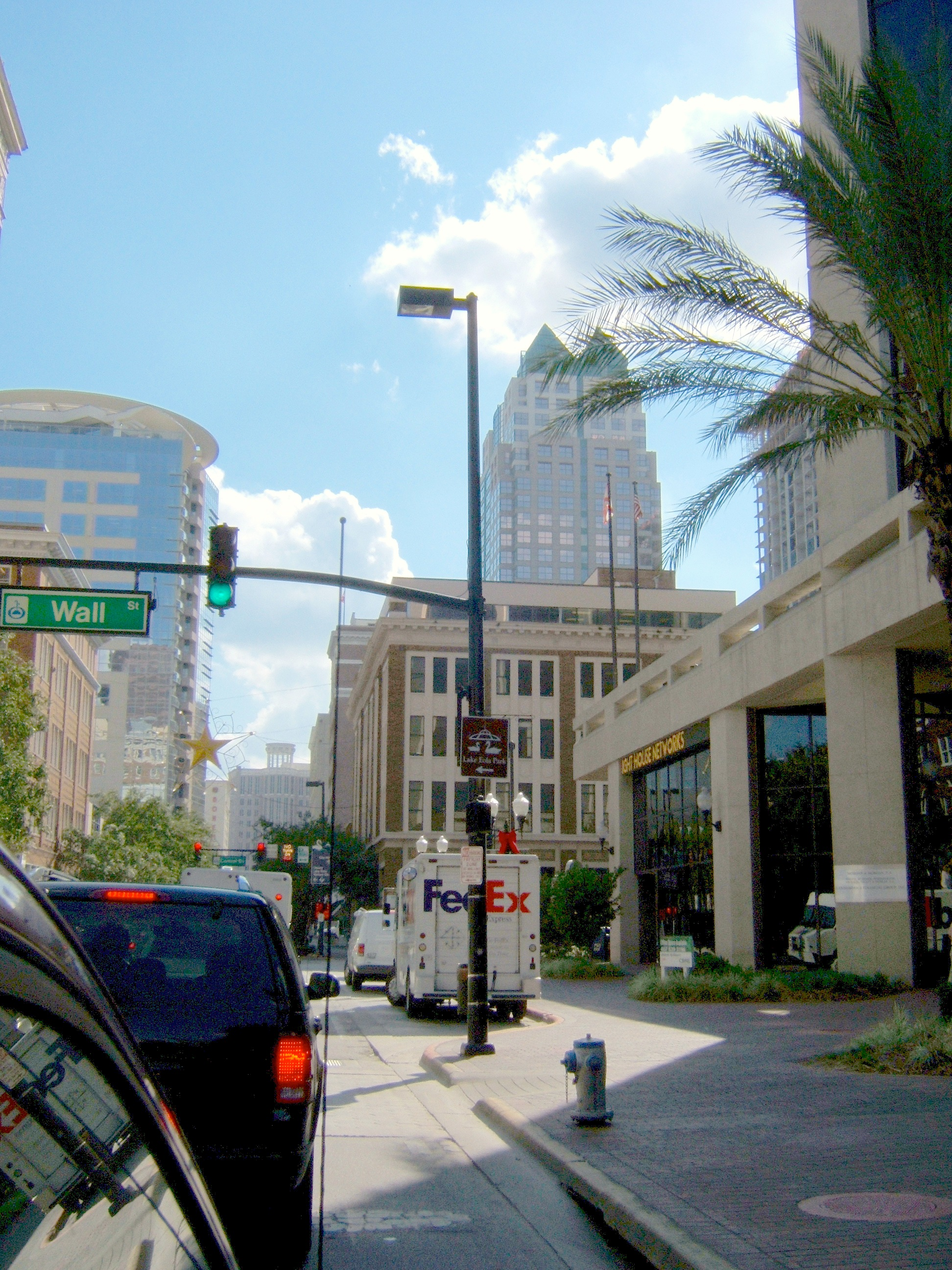 Downtown, le centre d'Orlando, avec le SunTrust Center en arrière plan.